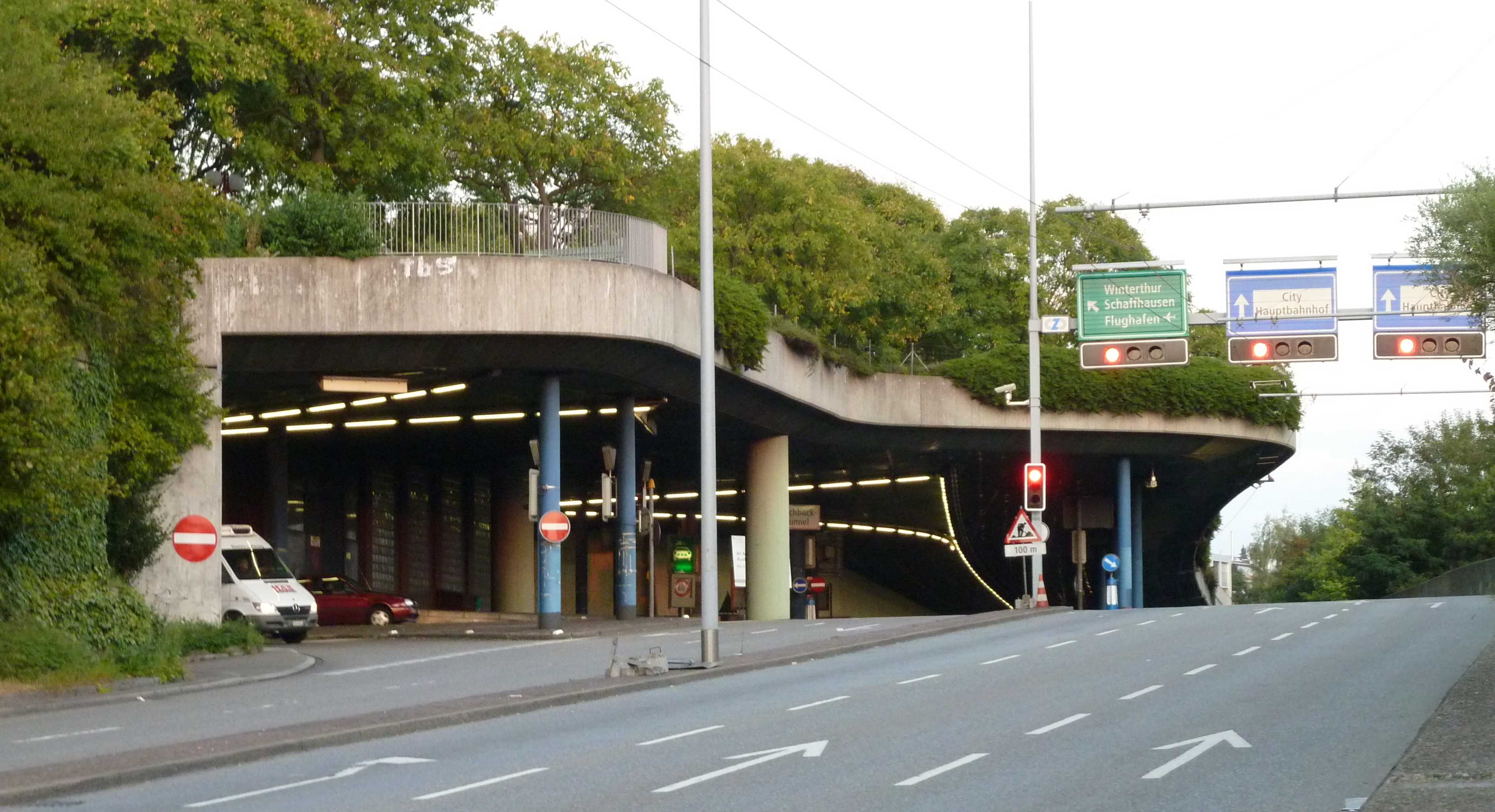 Südportal des Milchbucktunnels in Zürich